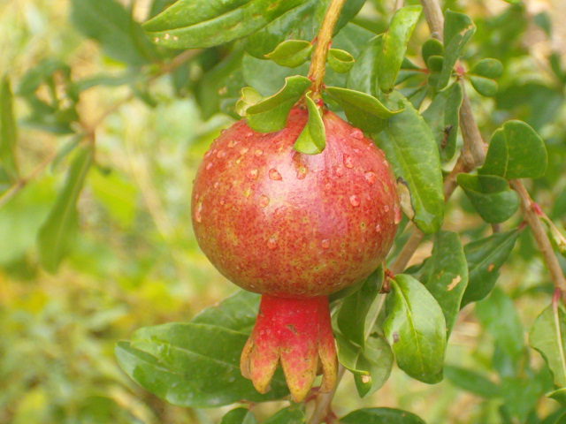 Pomegranate waterdrops